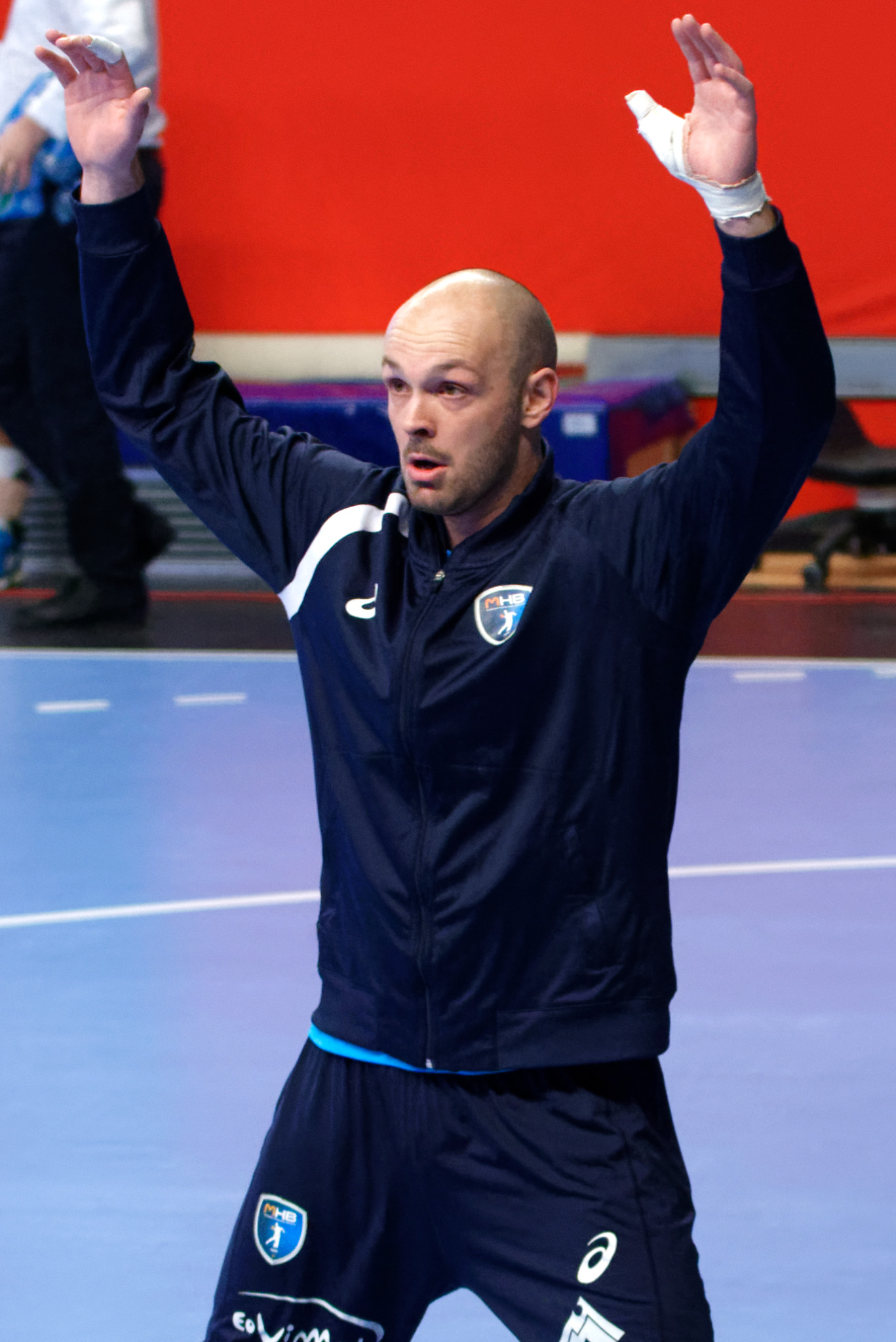 Rencontre de championnat entre le PSG et Montpellier. A Coubertin, le 1er mars 2018.